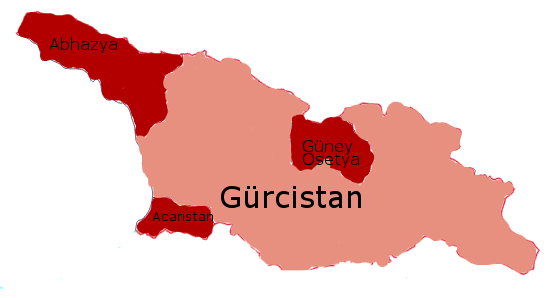 Geoorgia and Osetia, Abkhazia, Adjara politic map